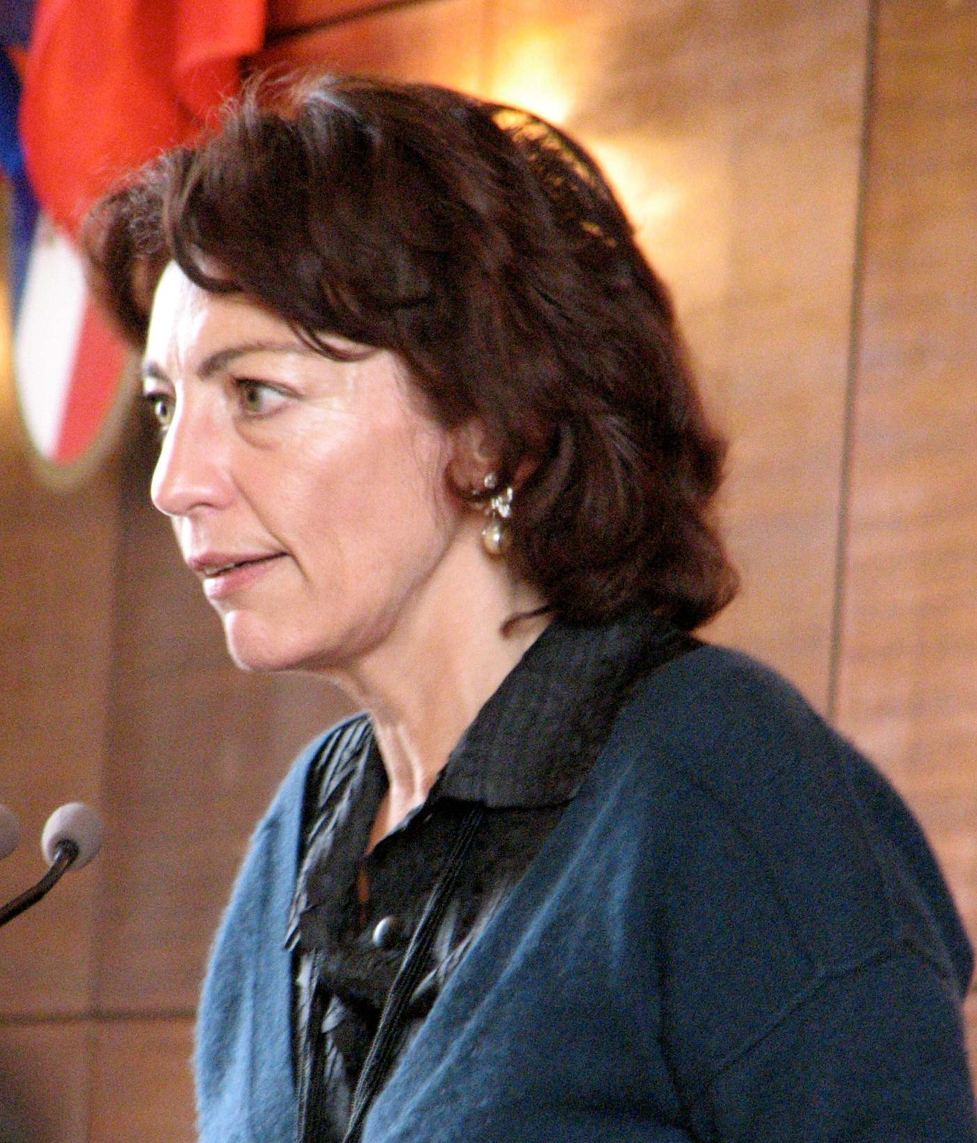 Marisol Touraine